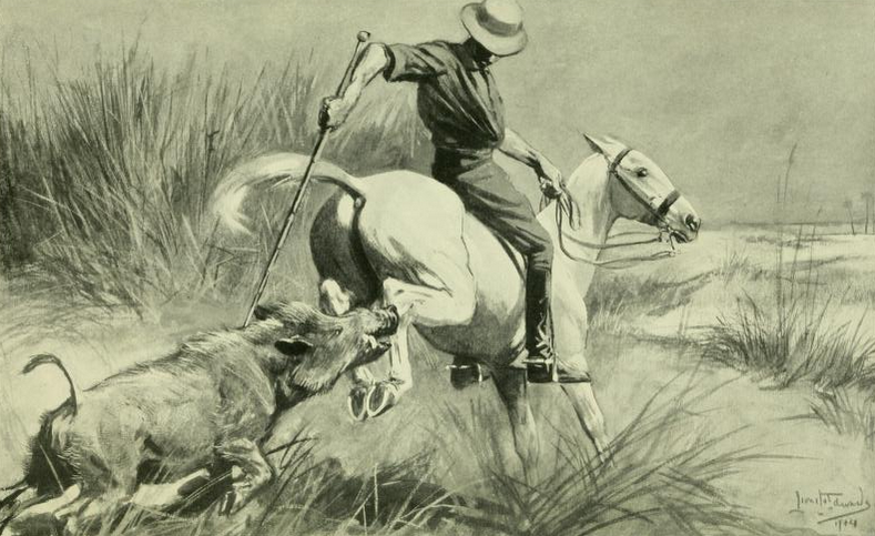 Boar hunting in India.